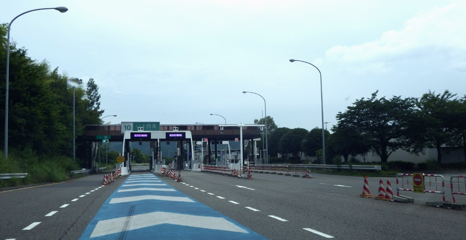 いよ西条インターチェンジの出口